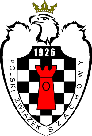 Символ Польского Шахматного Союза